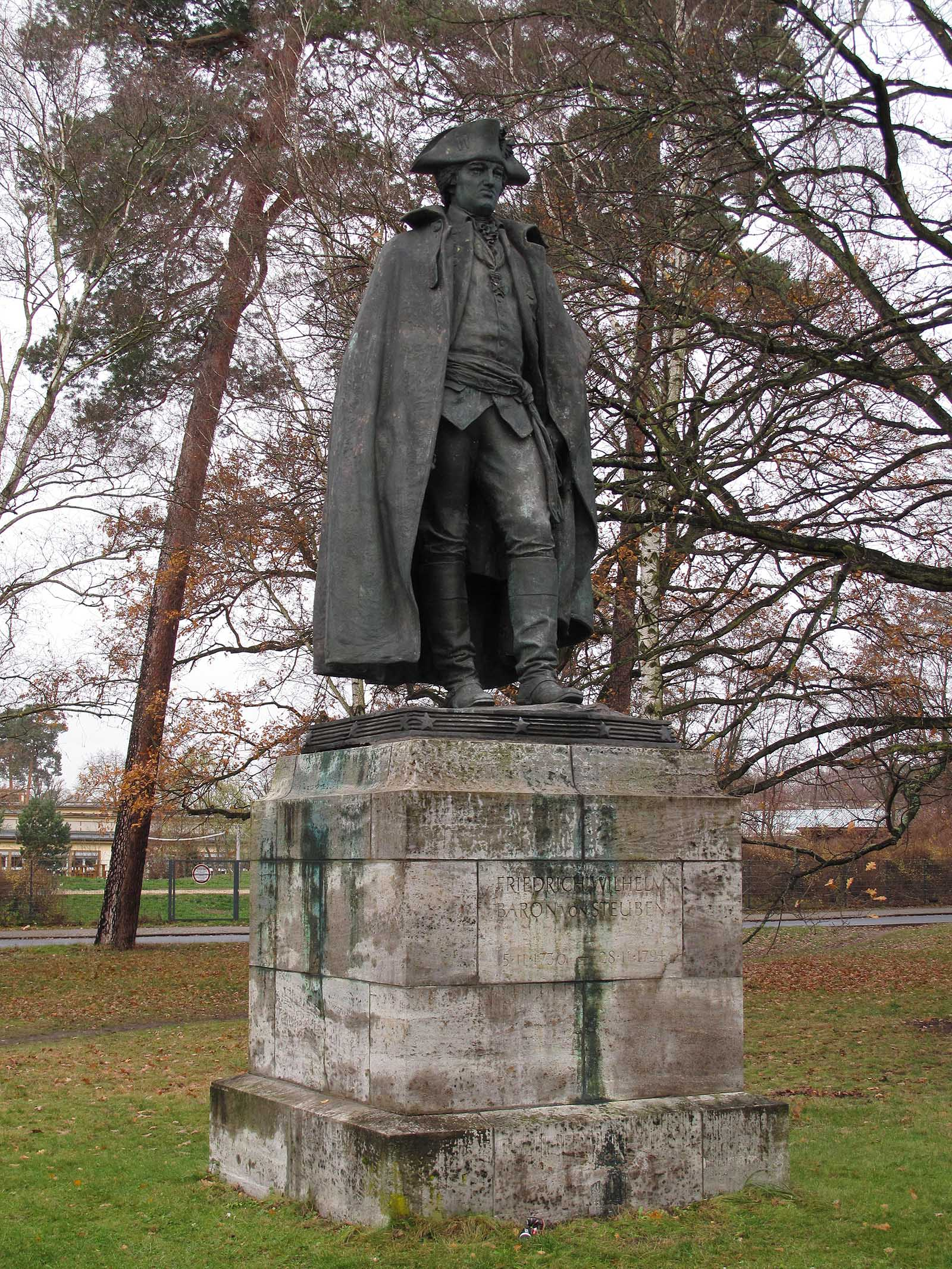 Albert Jaegers, Denkmal für Baron Friedrich Wilhelm von Steuben, 1910, (aufgestellt 1987), - Berlin-Dahlem, Clayallee 200 – (Abguss des Denkmals, das am Weißen Haus in Washington 1910 enthüllt worden war)